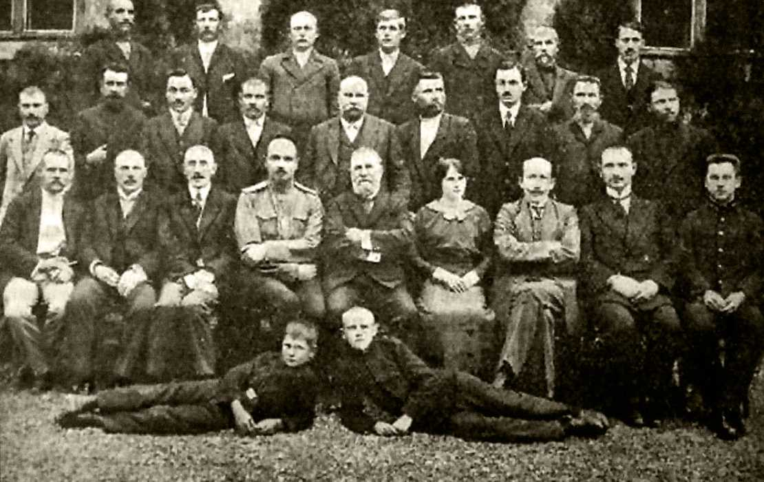 Руководители и участники курсов по кредитной кооперации в Одессе, 1915 год.